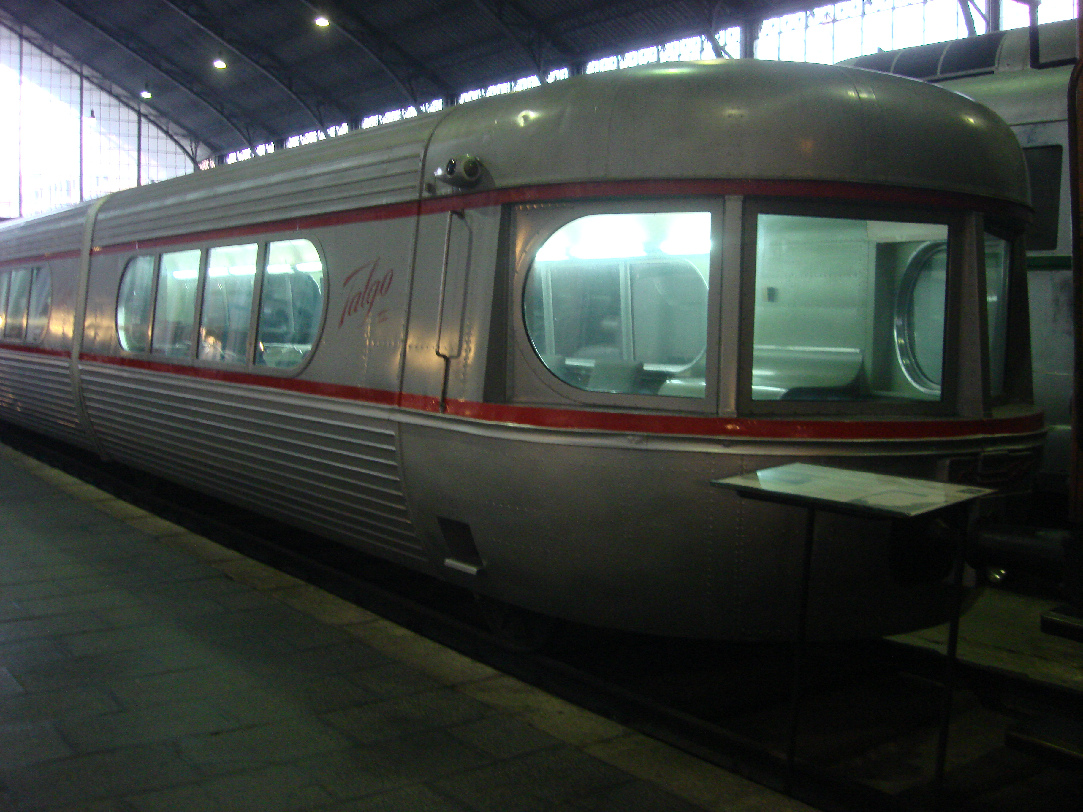 Own work